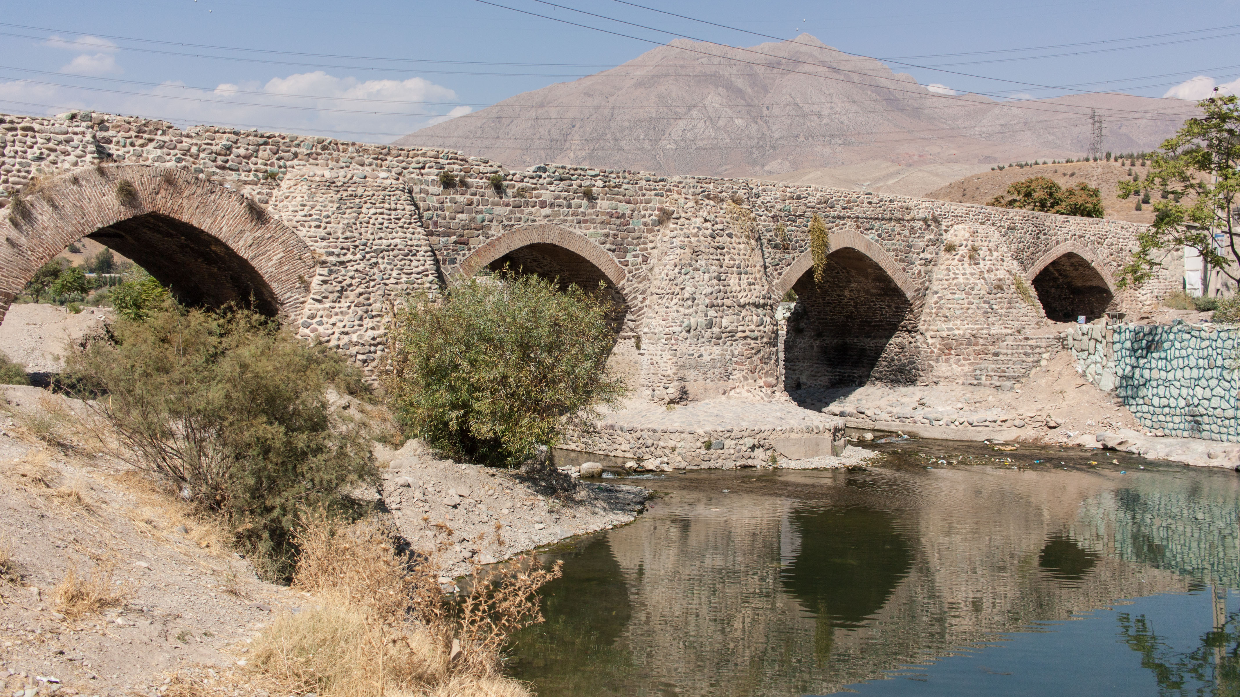 پل جاجرود. پل شاه عباسی جاجرود از آثار دوران سلجوقیان بر روی رودخانه جاجرود و در ۱۰ کیلومتری شمال شرق تهران در روستای سعیدآباد است. این پل در دوره های صفویه، قاجاریه و پس از آن بارها و مرمت شده و از جمله در زمان ناصرالدین شاه قاجار به دست حاج میرزا بیک نوری فراش خلوت شاه با هزینه بیست و چهار هزار تومان بازسازی شده است. تا سال ۱۳۴۲ این پل پل راه اصلی رفت‌وآمد مردم تهران به دماوند و مازندران بود.